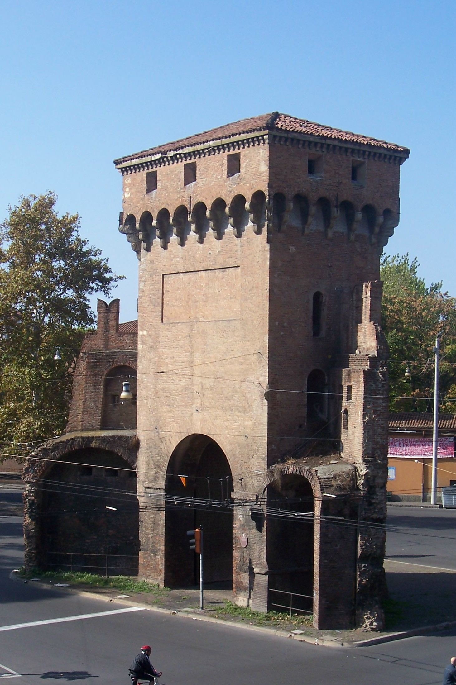 Porta San Felice, Bologna, Italia